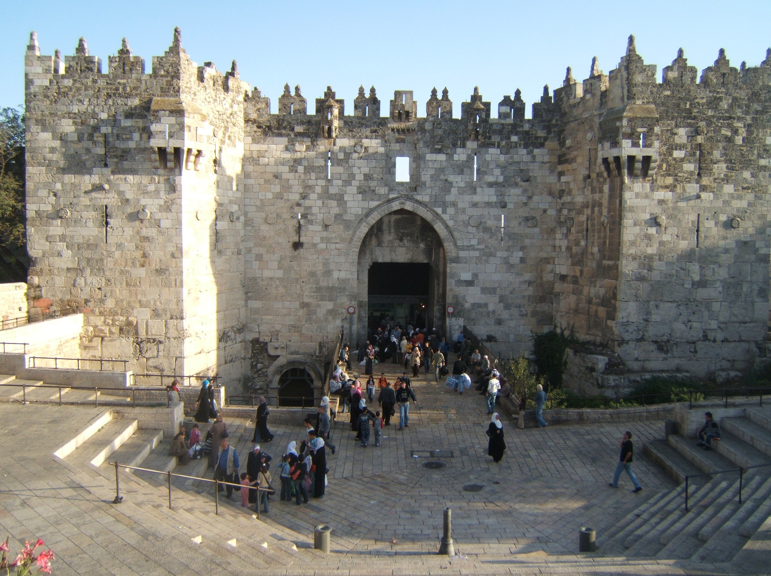 Damascus Gate, Jerusalem